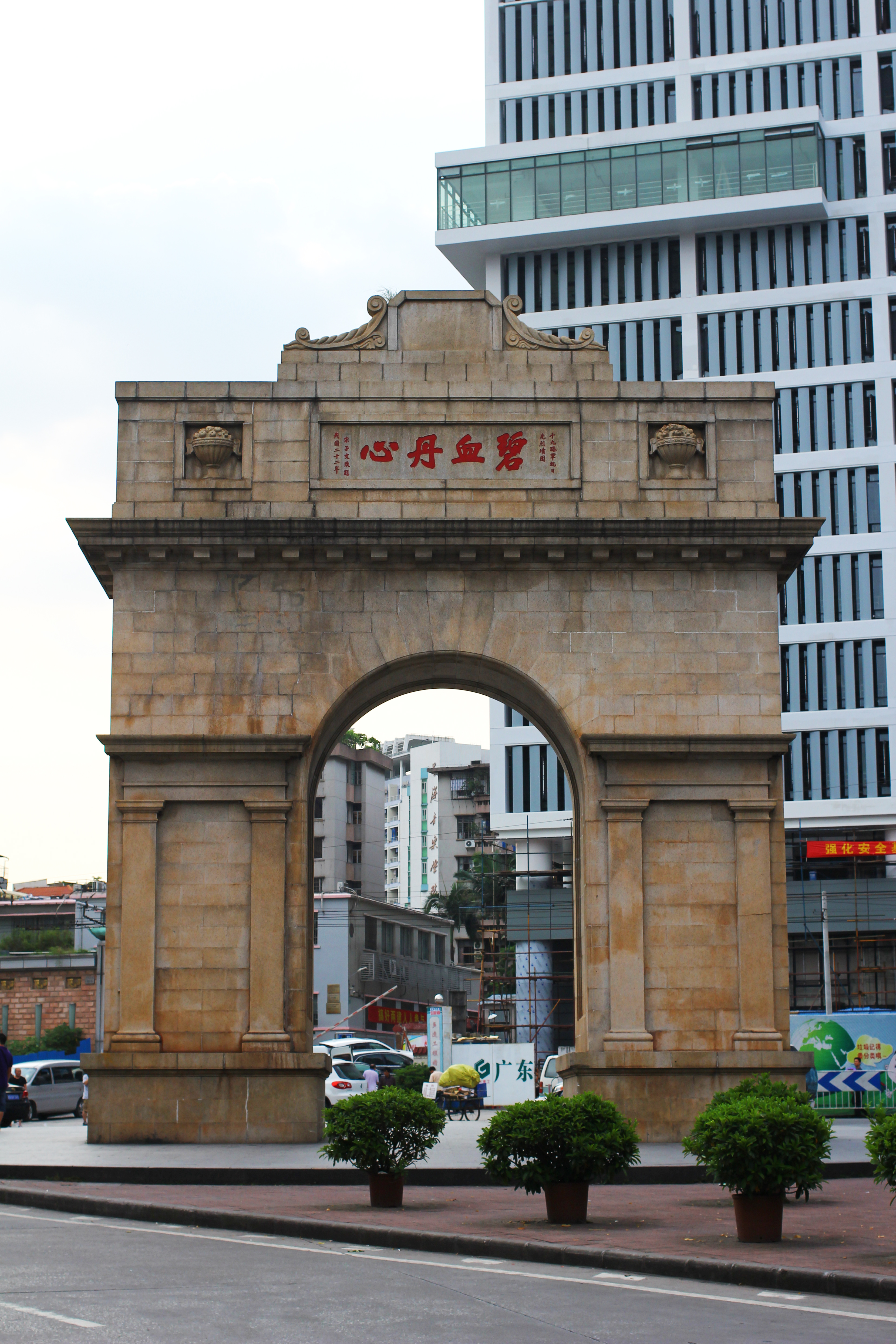 位於廣州市的十九路軍抗日陣亡將士墳園凱旋門背面。宋子文題，碑文在文化大革命期間曾被破壞。